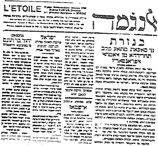 Al-Nijma (1920-1961), a Judeo-Arabic newspaper published in Souss, Tunisia by Maklouf Nadjar